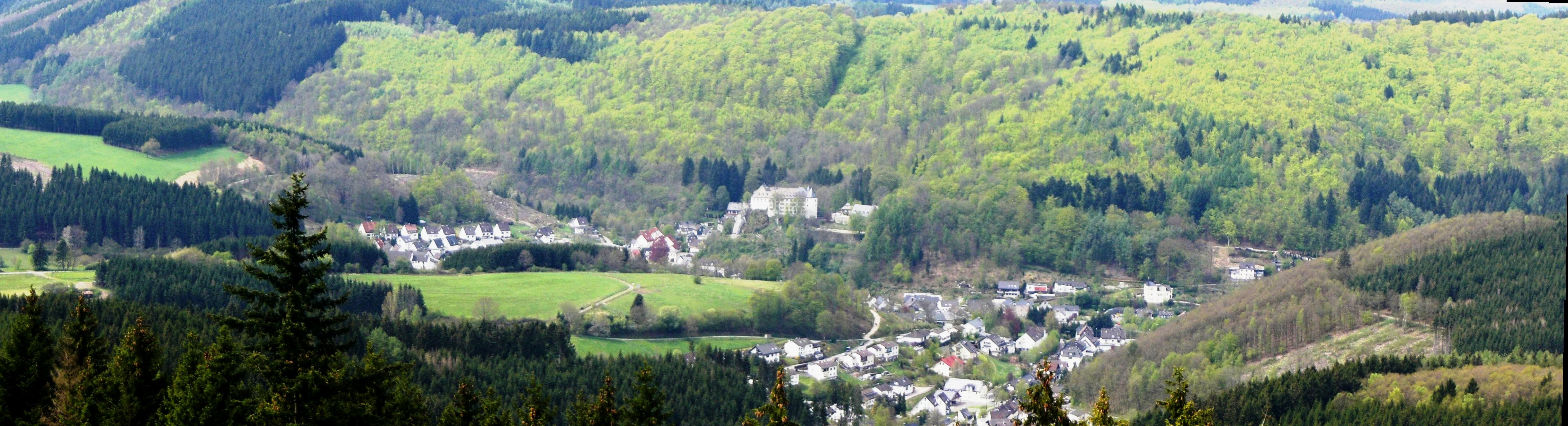 Blick auf Bilstein vom Turm der Hohen Bracht